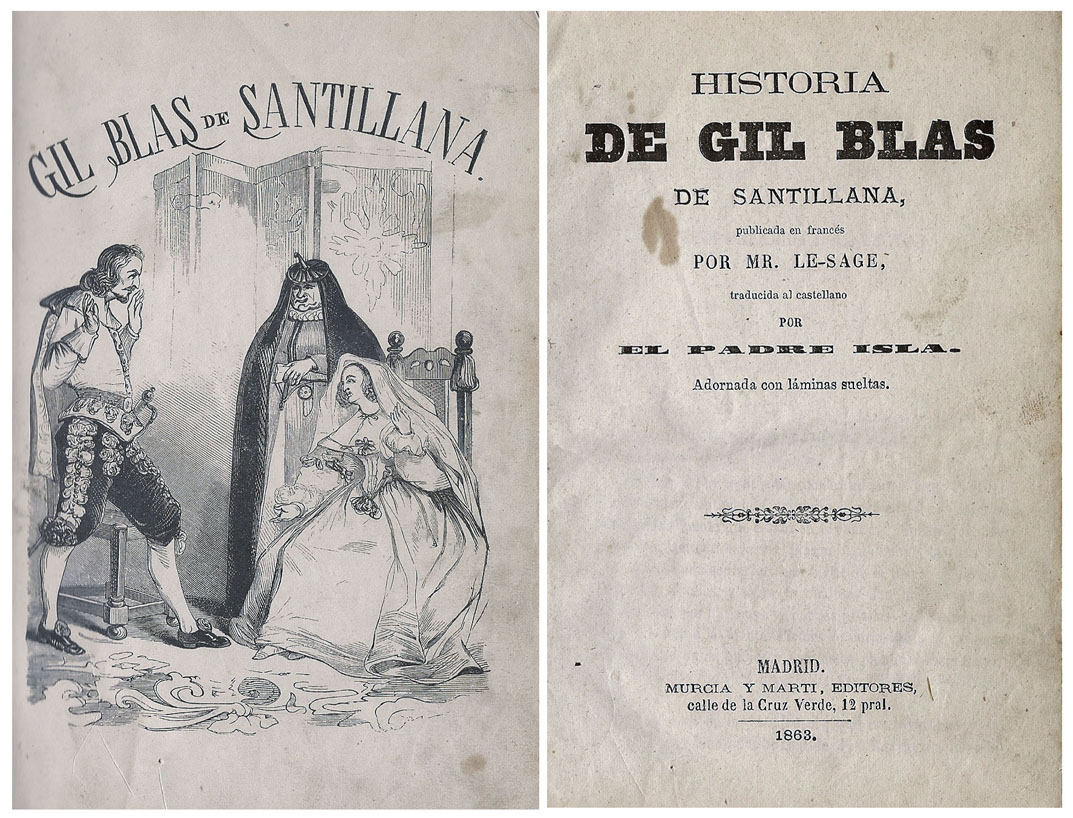 Historia de Gil Blas de Santillana, publicado en Madrid por Murcia y Martí editores en 1863, en un solo tomo. 18632020-05-11 13:50:55